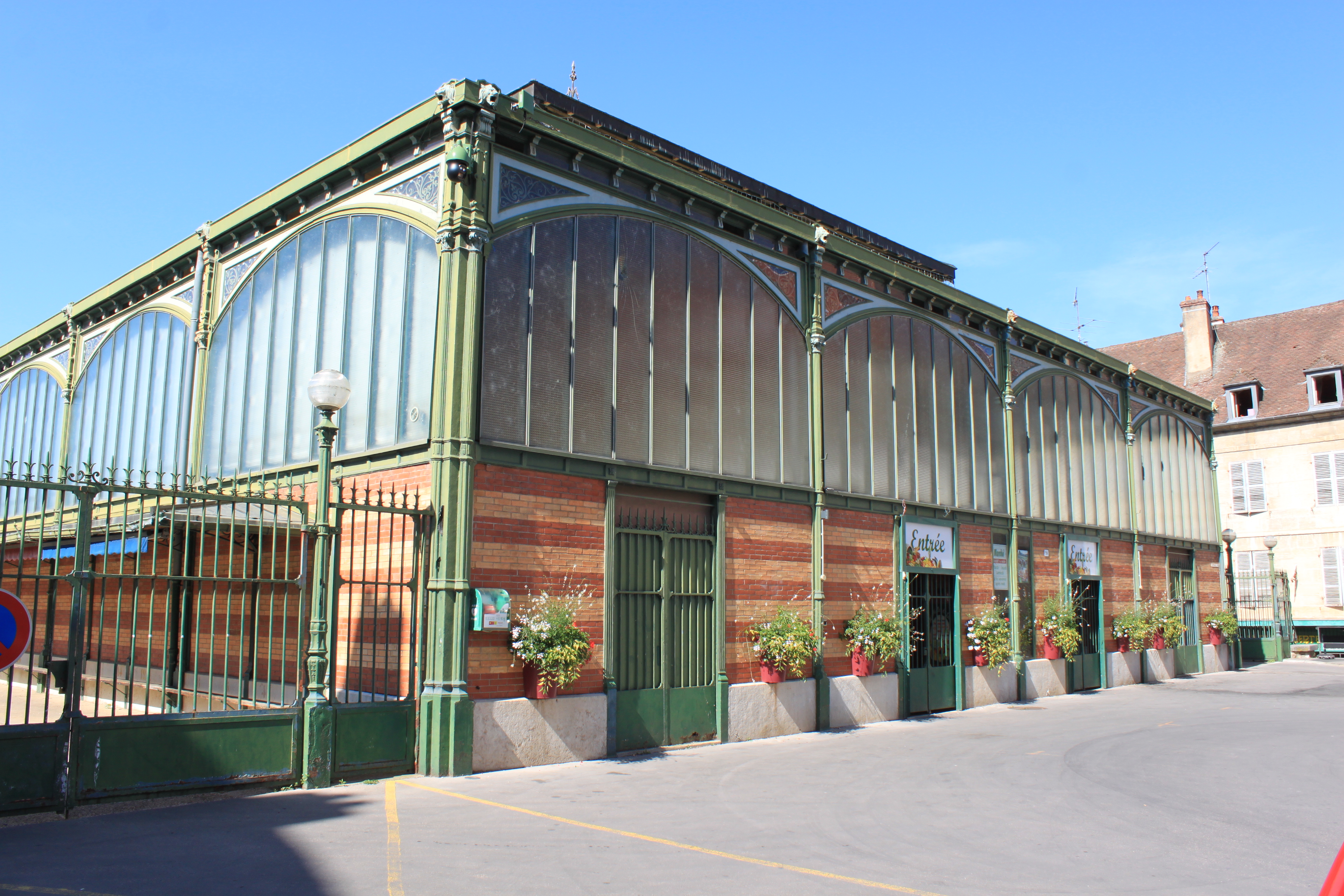 Dole, Jura, Bourgogne-Franche-Comté, France